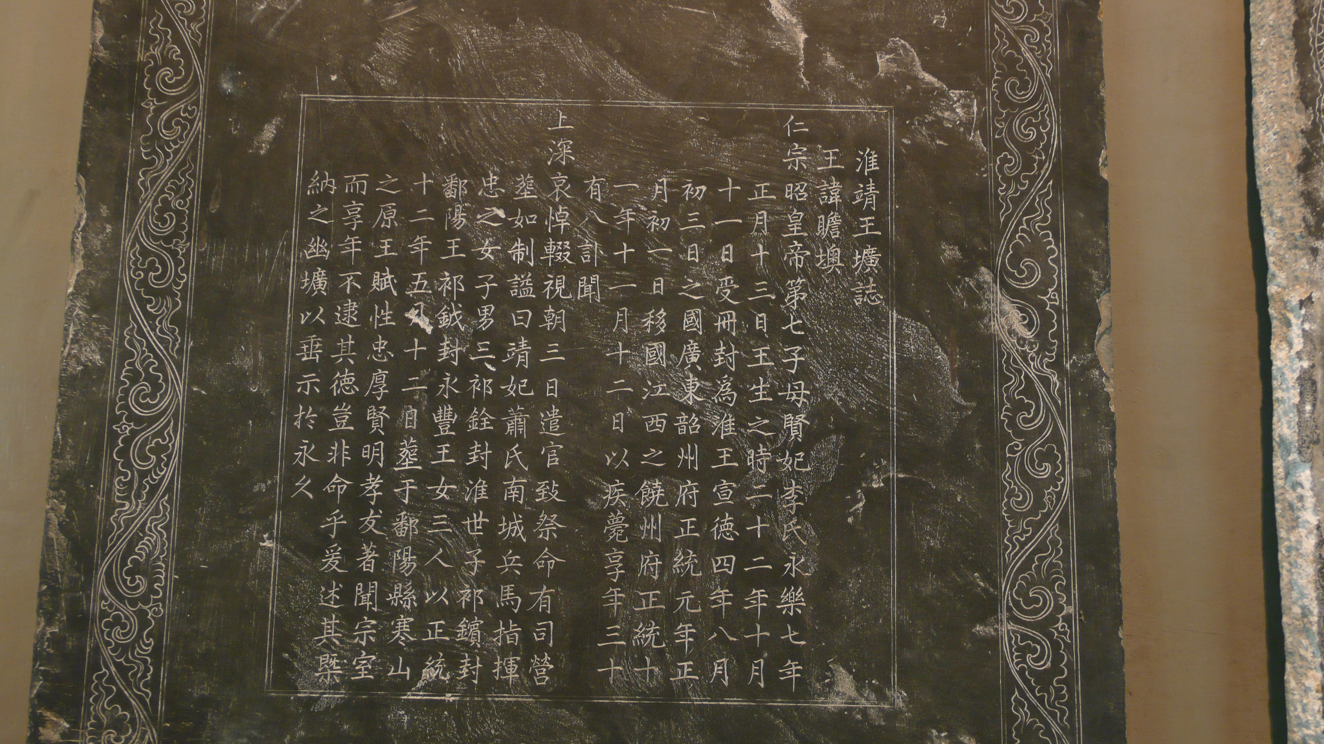 中文（台灣）: 淮靖王壙誌